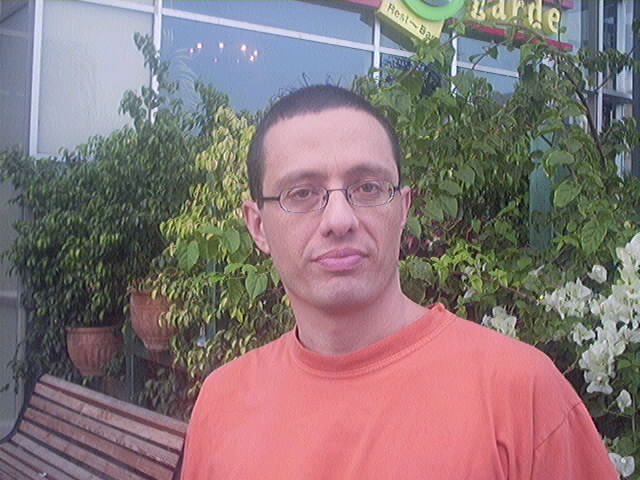 צולם על ידי אבי קדמי, אחרי צילום של תוכנית "רק בישראל" This picture was taken by Avi Kedmi